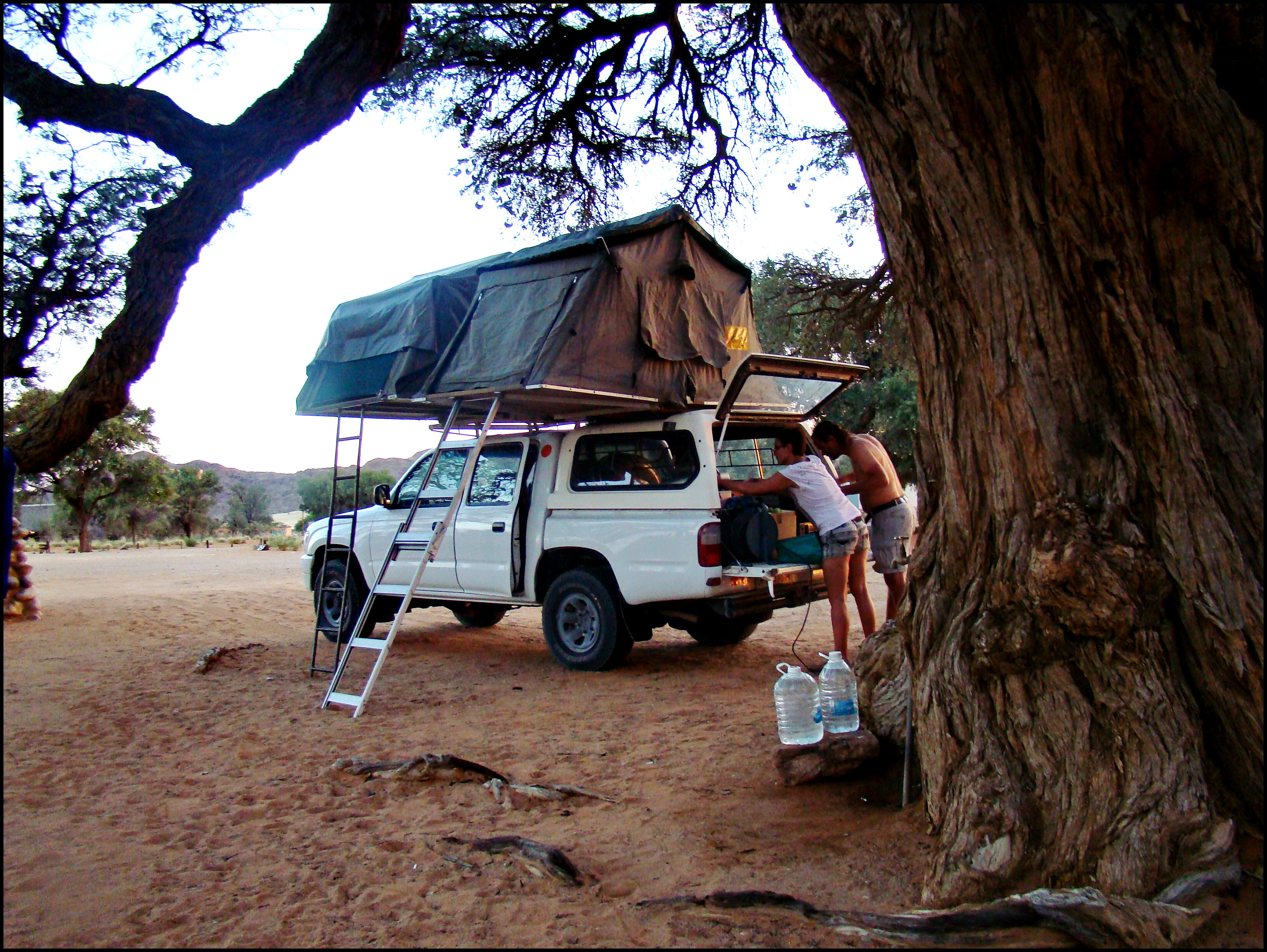 Обычный и дешёвый способ установки полевого лагеря в пустыне